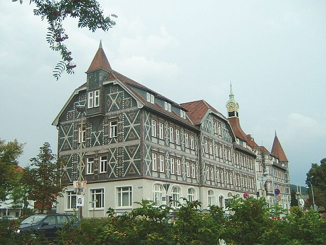 Neues Rathaus in Einbeck, Germany